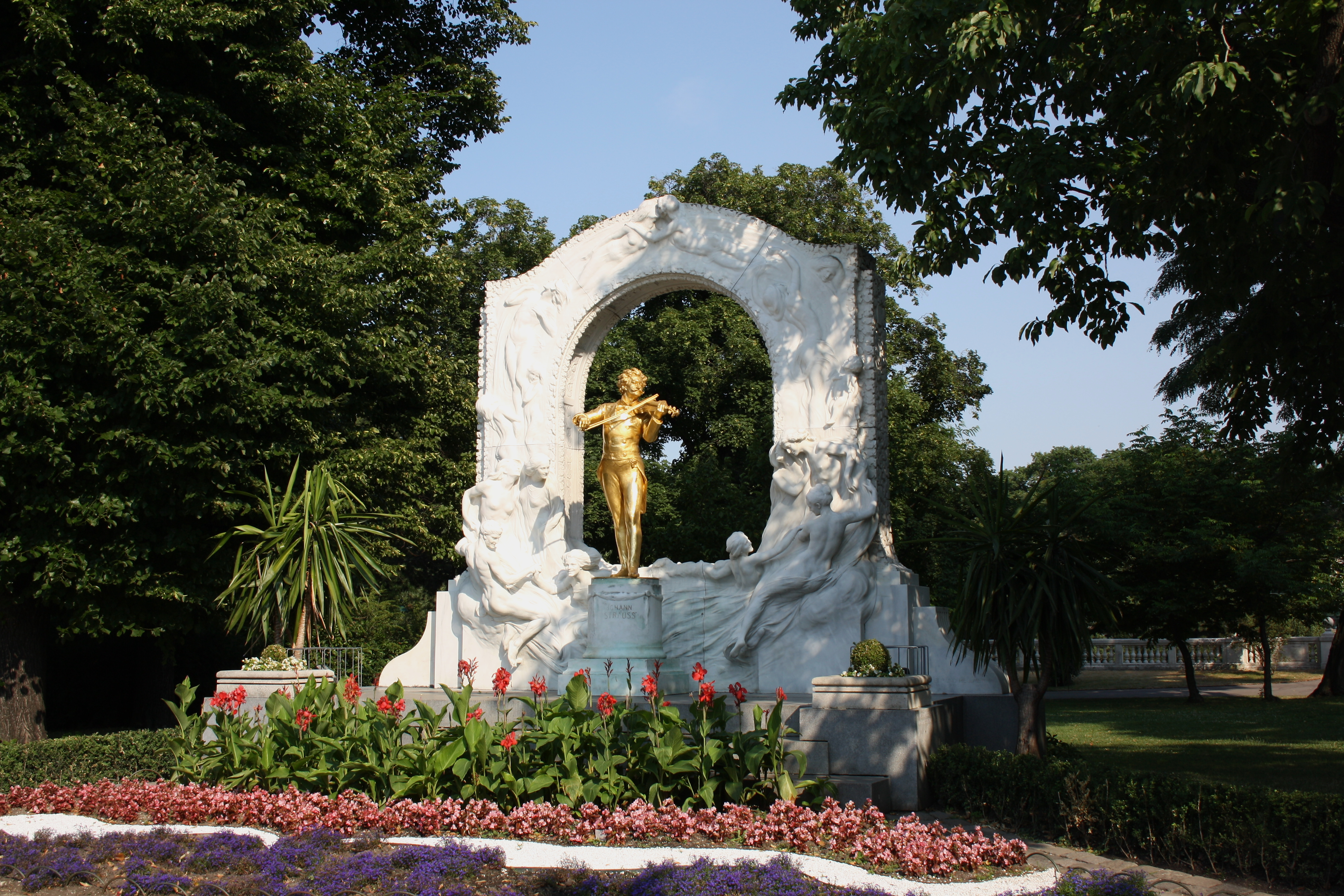 Das Johann-Strauß-Denkmal in Wien, Bildhauer: Edmund von Hellmer (1850-1935)